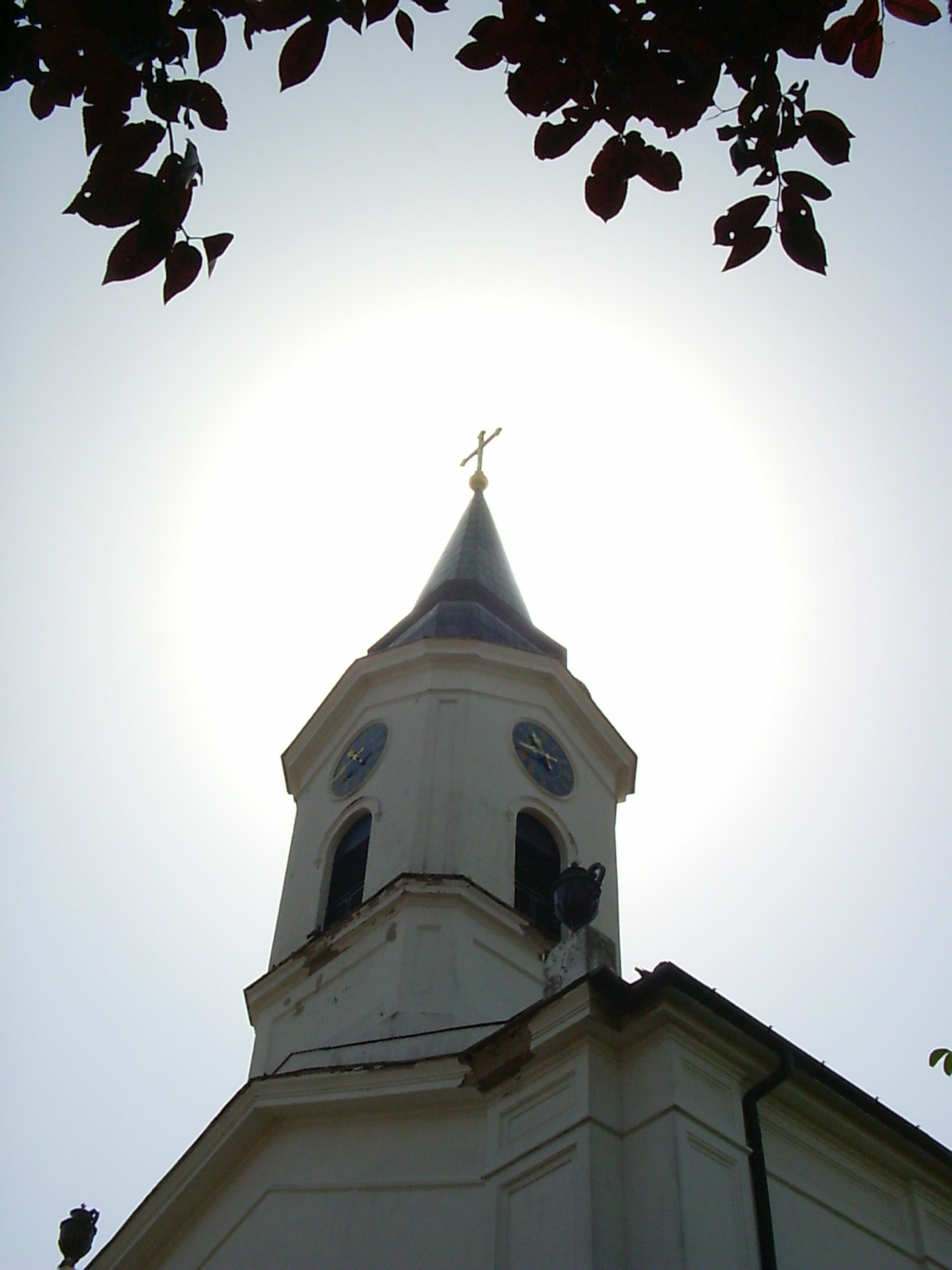 Újkígyósi Szűz Mária Római Katolikus Templom